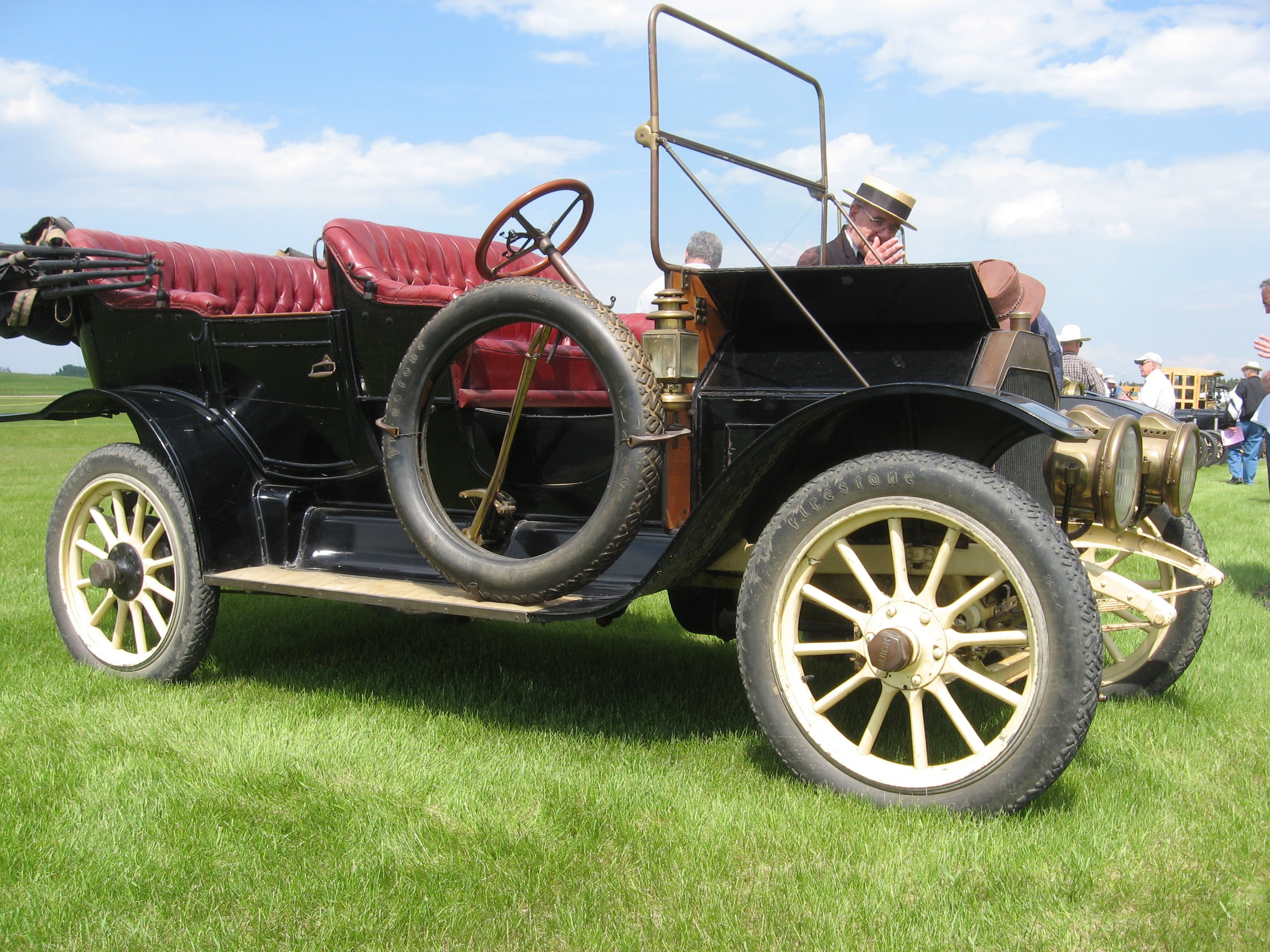 1910 McLaughlin Buick Reynolds Alberta Museum